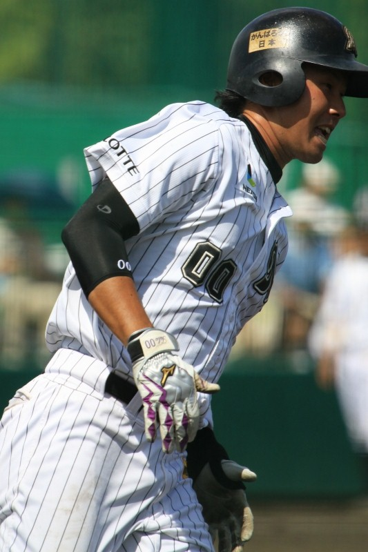 日本プロ野球 千葉ロッテマリーンズ 高濱卓也 内野手